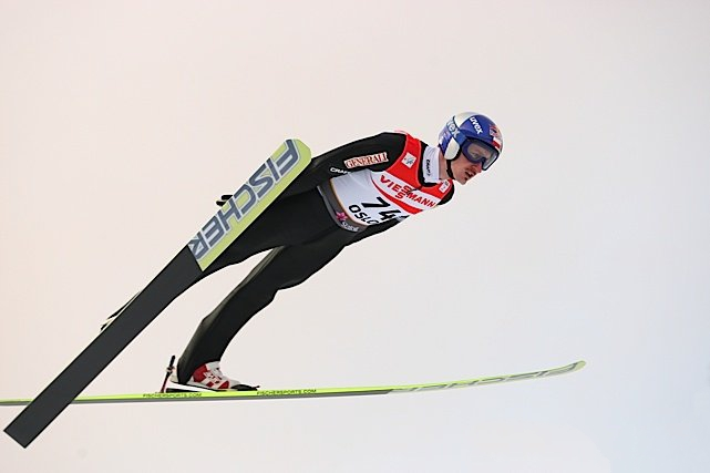 Adam Małysz podczas serii treningowej przed konkursem indywidualnym mężczyzn na Mistrzostwach Świata w Narciarstwie Klasycznym 2011 w Oslo.